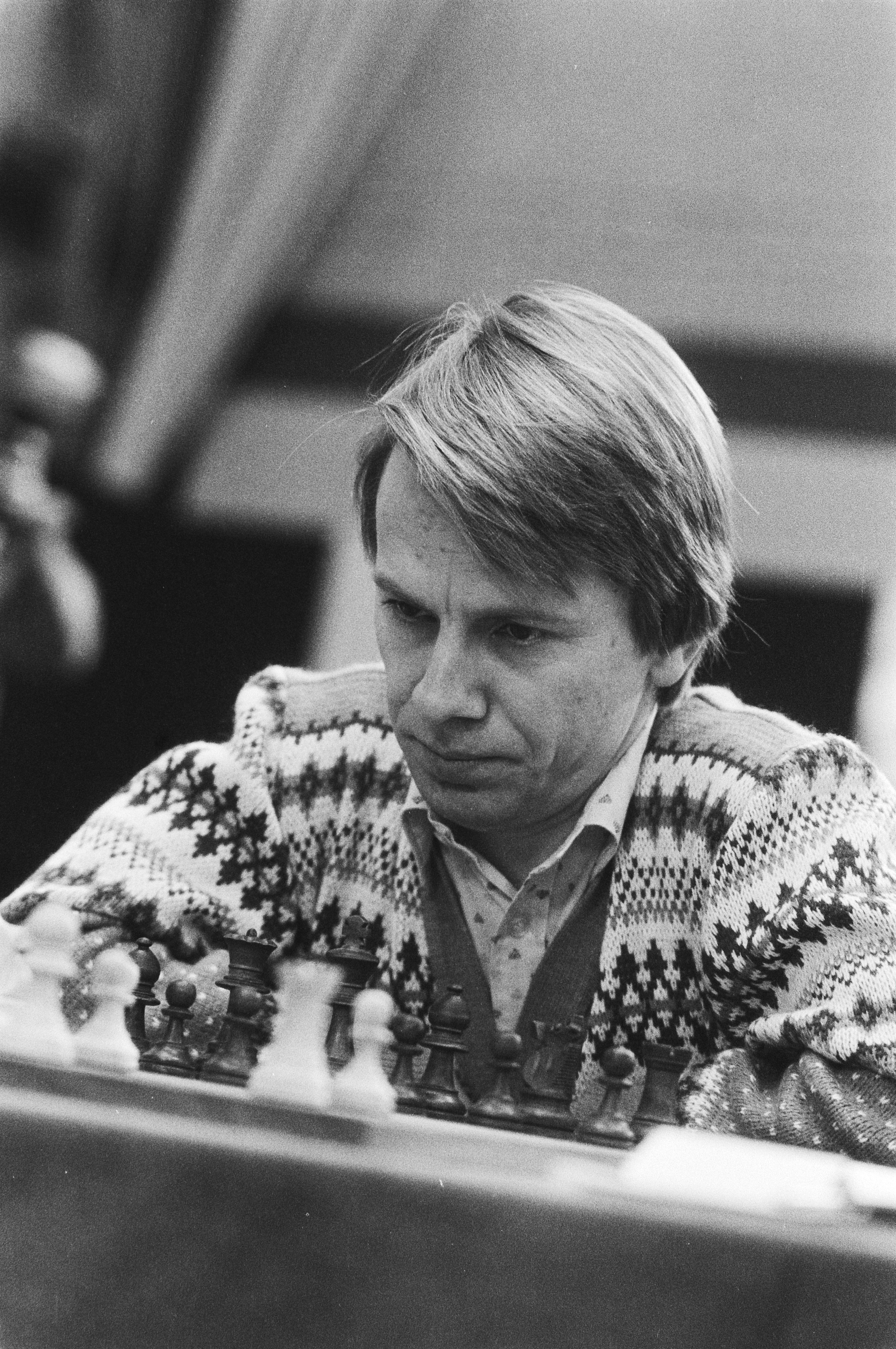 Collectie / Archief : Fotocollectie Anefo Reportage / Serie : Hoogovens-schaaktoernooi, 4e ronde Beschrijving : Andersson in actie Annotatie : Randnummers negatiefstrook: nr. 20,21 Datum : 18 januari 1983 Locatie : Noord-Holland, Wijk aan Zee Trefwoorden : schaakwedstrijden, schaken Persoonsnaam : Andersson, Ulf Instellingsnaam : Hoogovenschaaktournooi Fotograaf : Bogaerts, Rob / Anefo Auteursrechthebbende : Nationaal Archief Materiaalsoort : Negatief (zwart/wit) Nummer archiefinventaris : bekijk toegang 2.24.01.05 Bestanddeelnummer : 932-4705